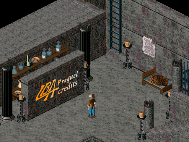 Capture d'écran de LBA Prequel, une mod du jeu vidéo Little Big Adventure (1994). La mod a été mise à disposition du public en décembre 2012 par des membres du MagicBall Network.